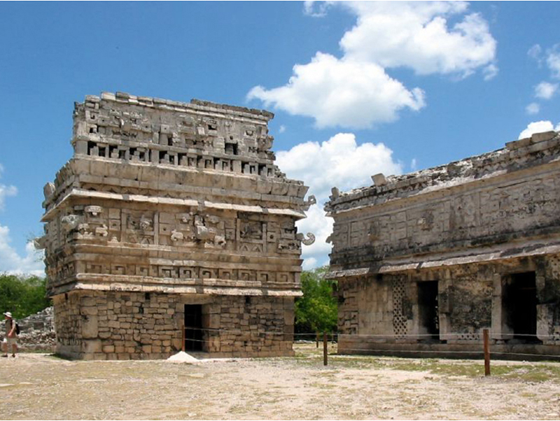 La Iglesia, Chichen Itza, Yucatan